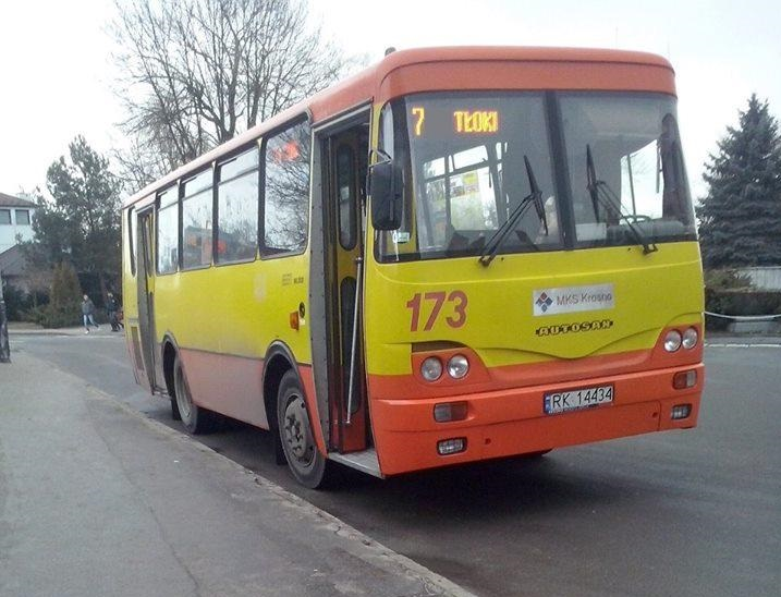 Autosan H9-35 z taboru MKS Krosno